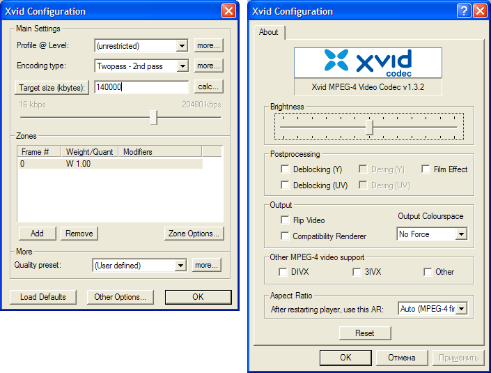 Скриншот